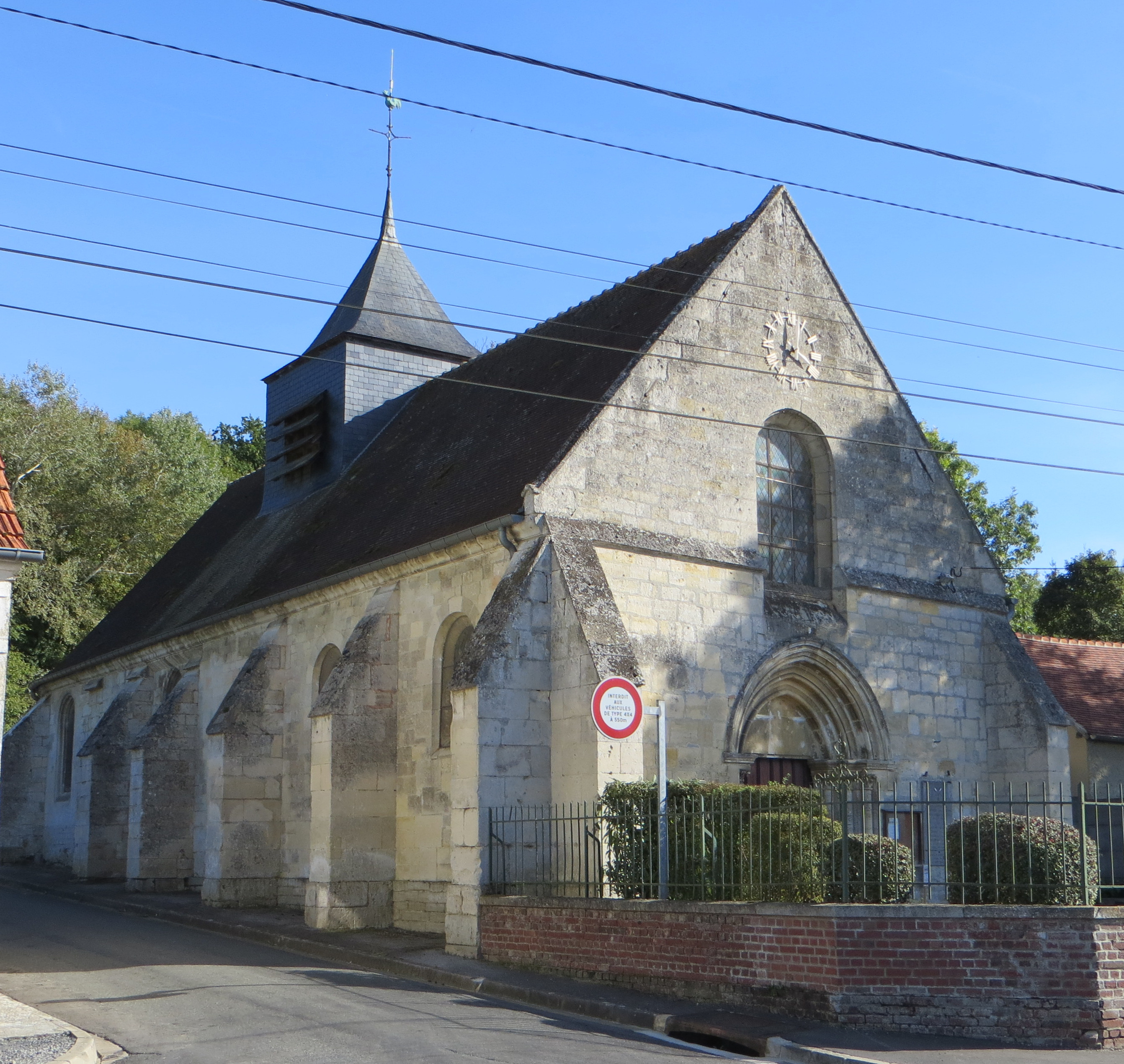 Vue générale de l'église